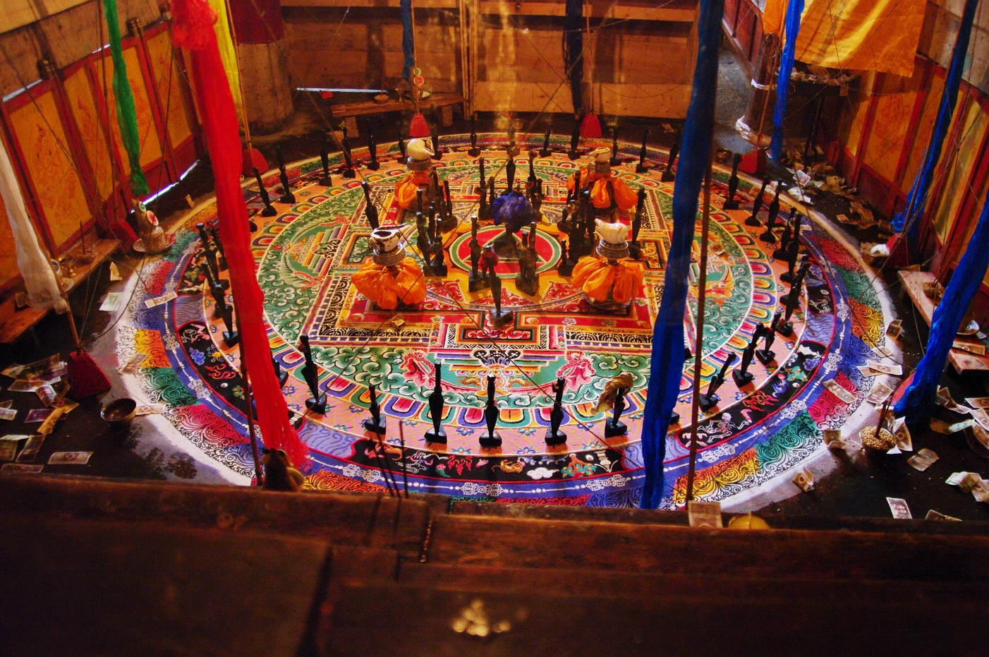 3D-Mandala im Kloster Pälkhor Chöde